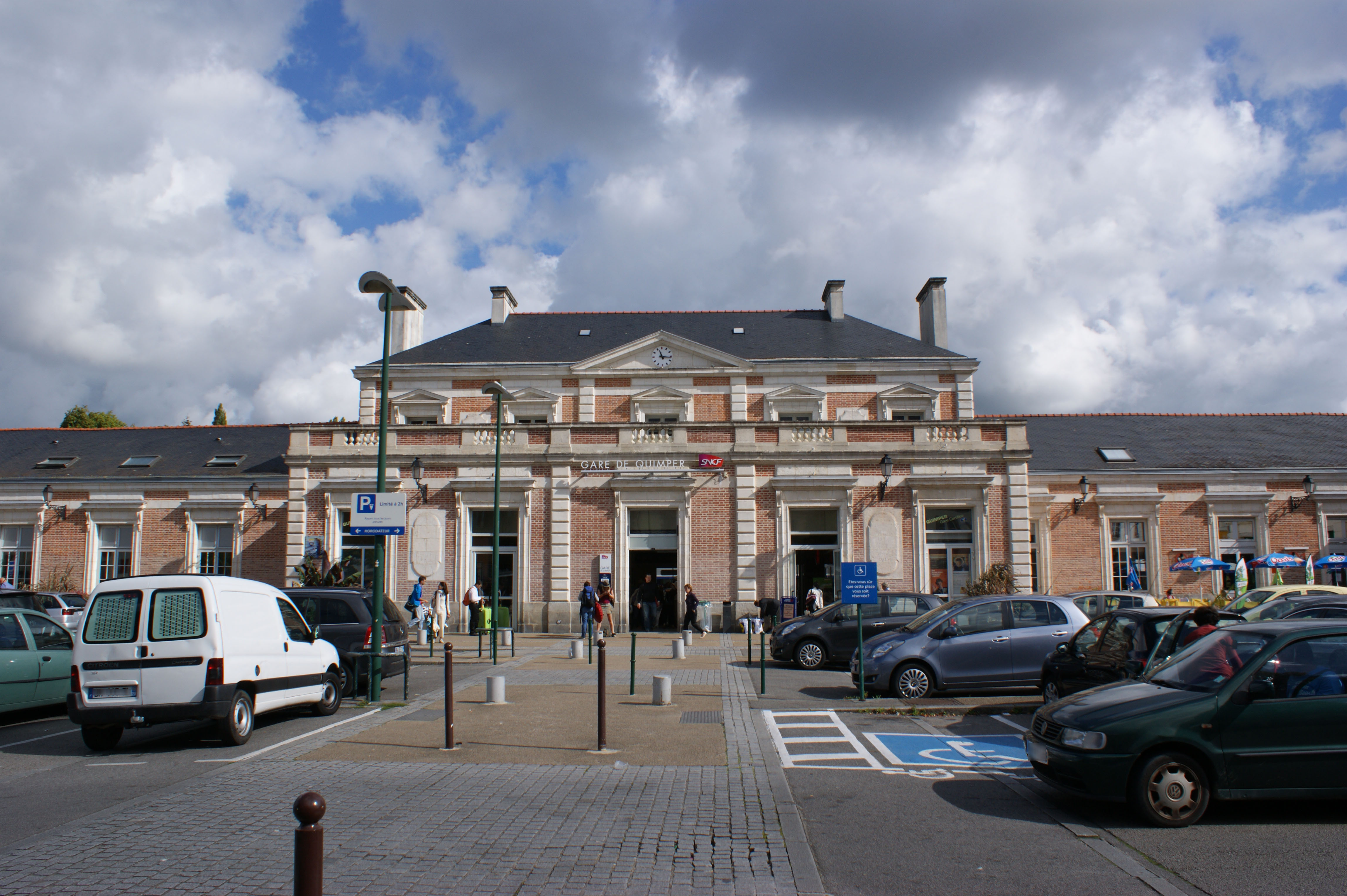 Le bâtiment voyageurs et l'entrée de la gare de Quimper